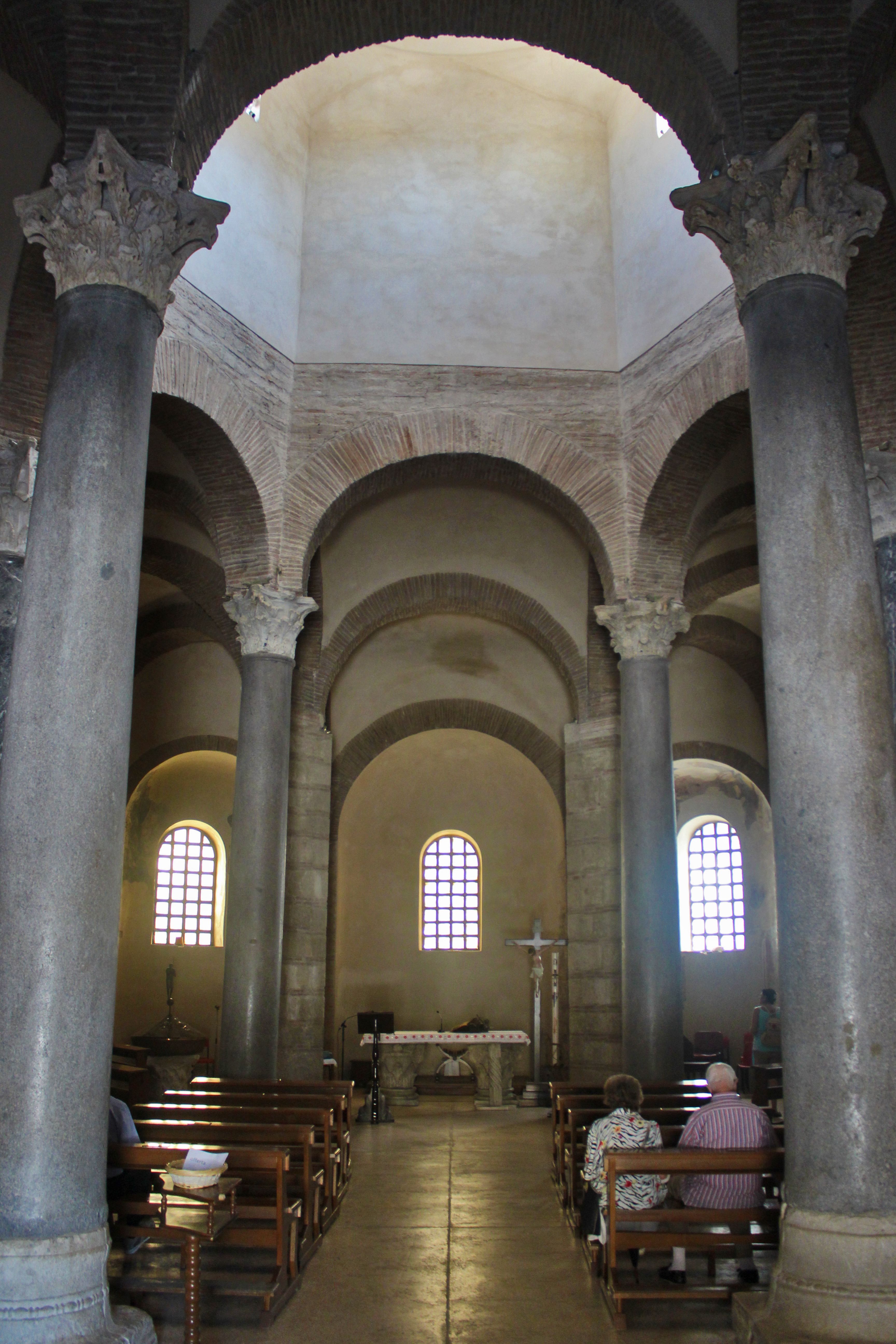 Benevento. Interior de la iglesia de Santa Sofía.